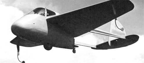 Alaparma AP75 Baldo Licensing Categoria:immagini di aeroplani